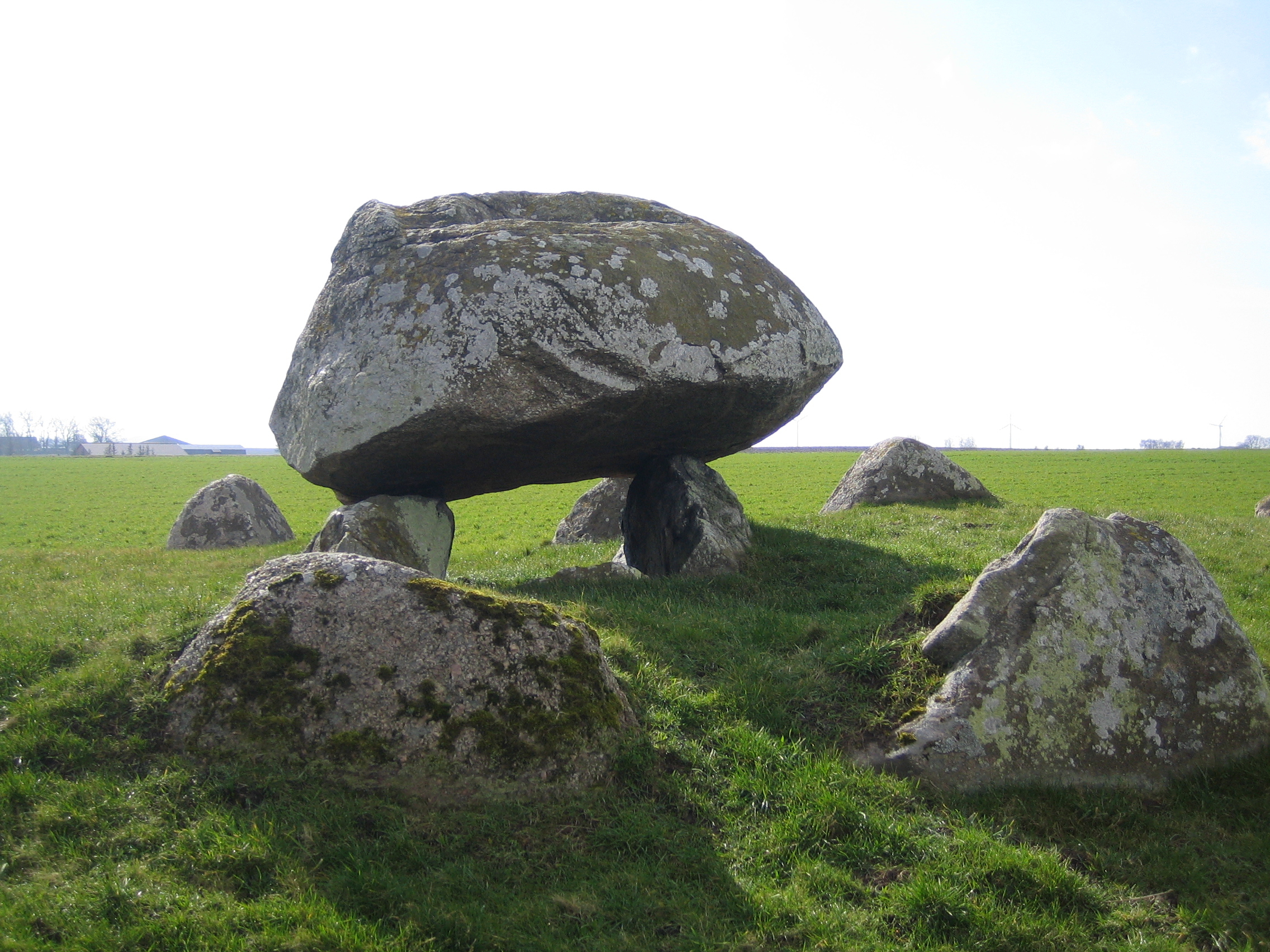 Skegrie megalith grave in Skåne, Sweden